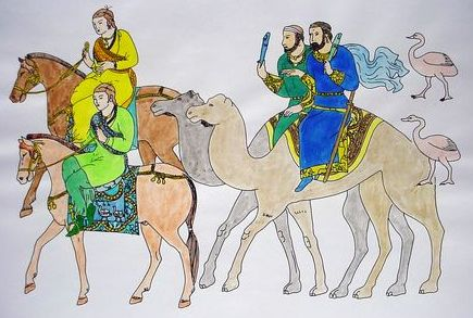 Falfestményrészlet Afrasziabból